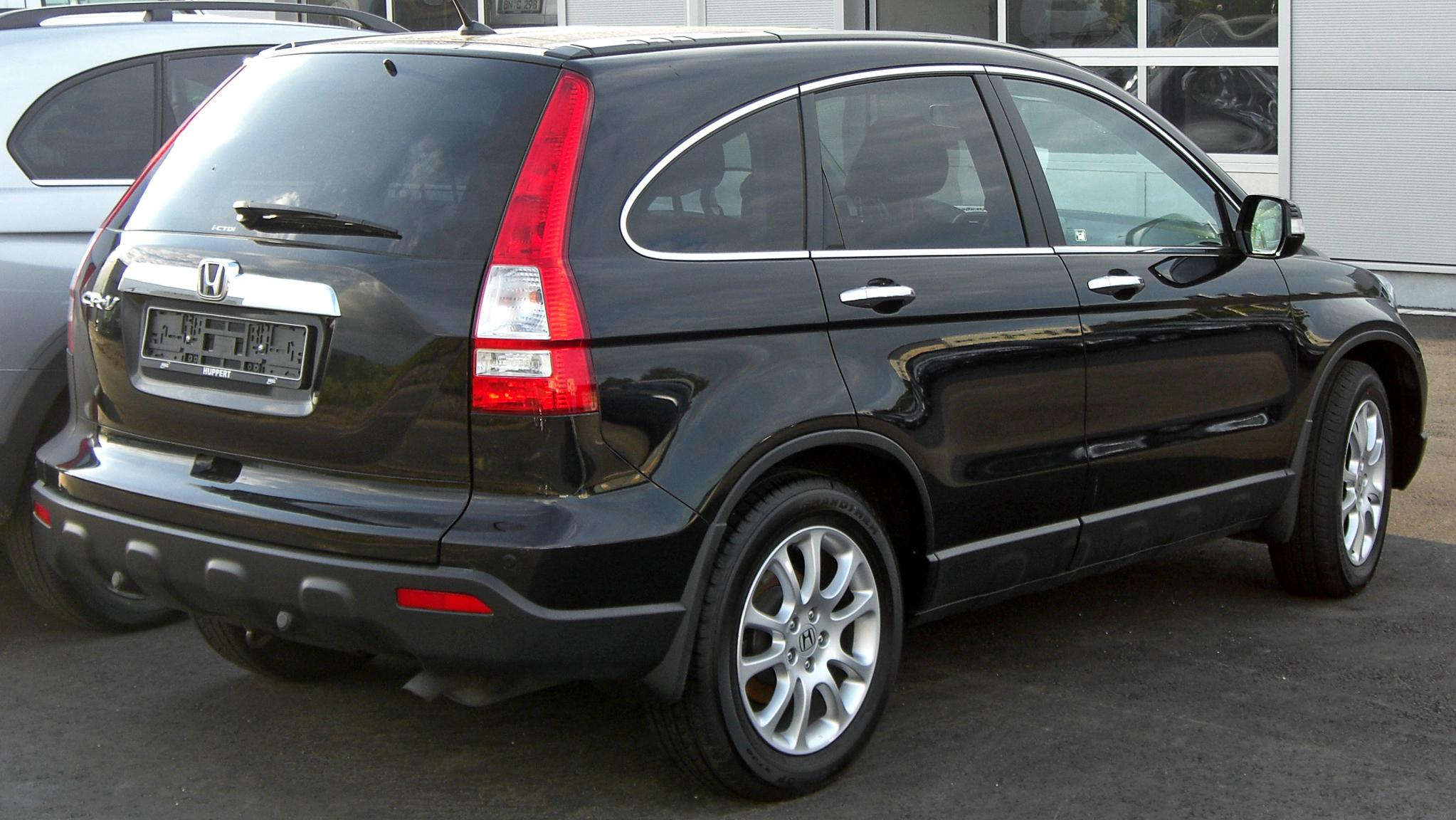 Honda CR-V III.